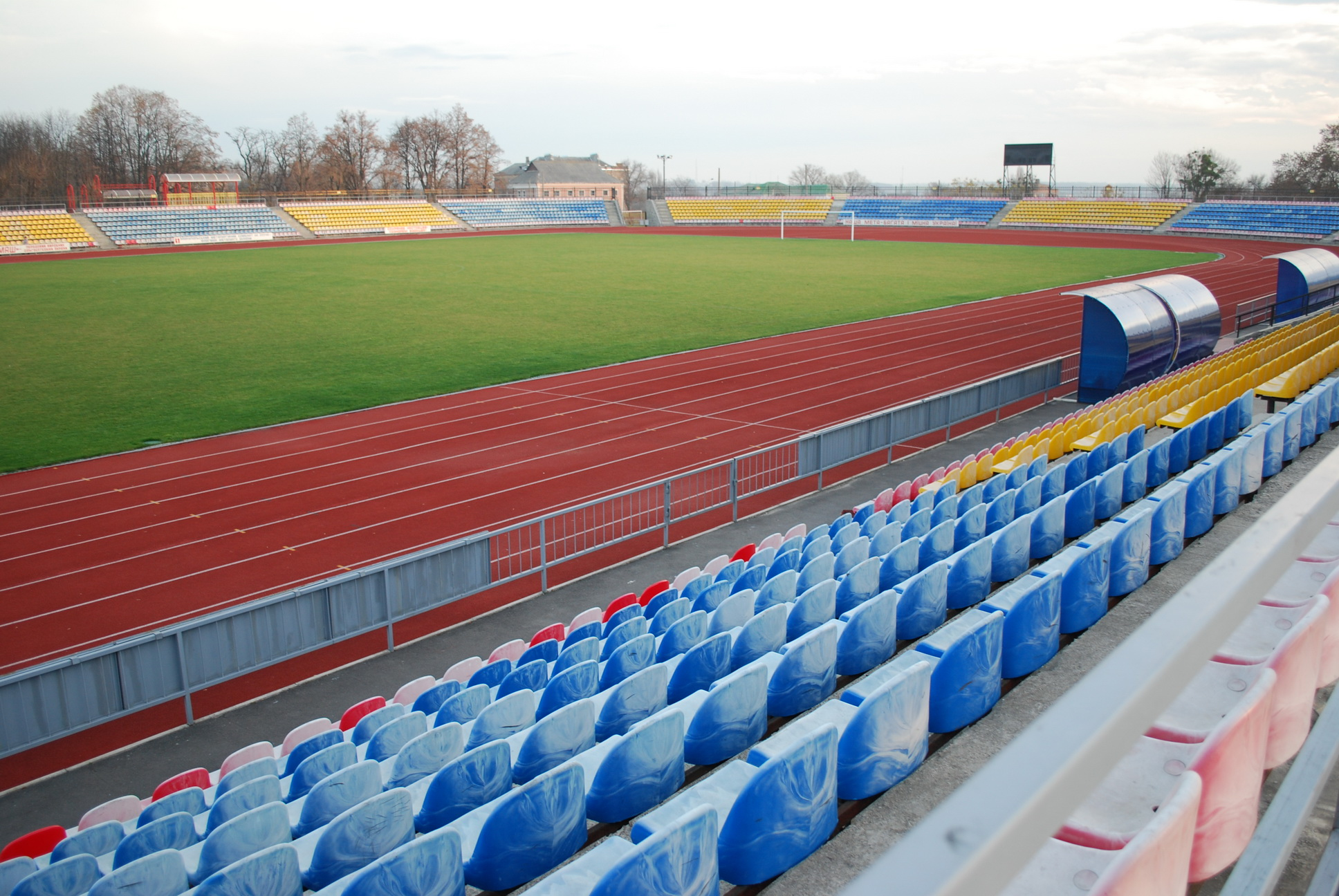 м.Умань, вул. Коломенська, 12